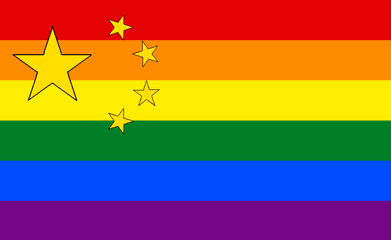 Bandera gay China.